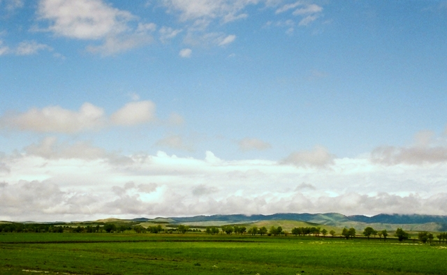 ჯავახეთი. ლანდშაფტი